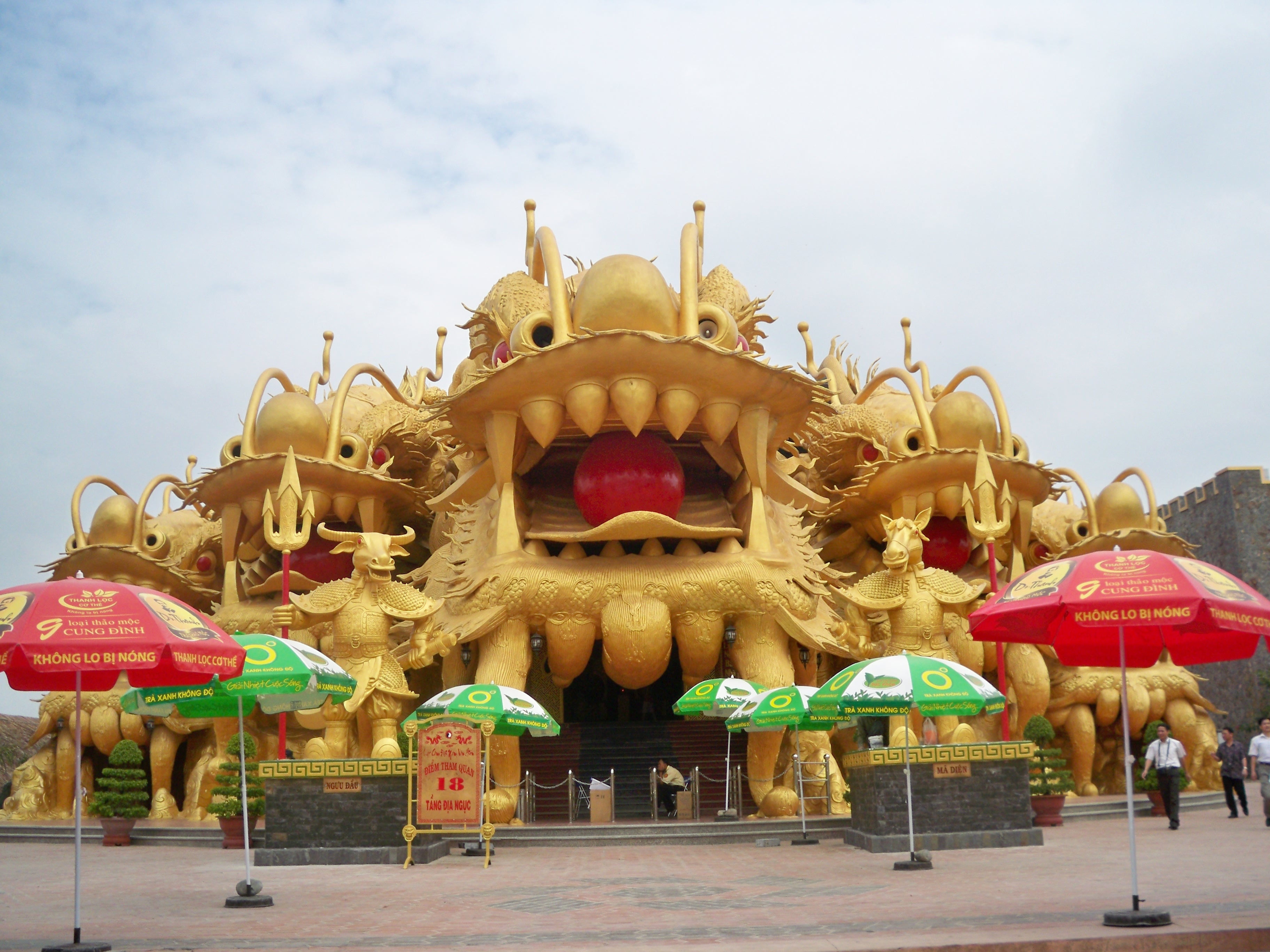 Khu trò chơi khu du lịch Đai Nam